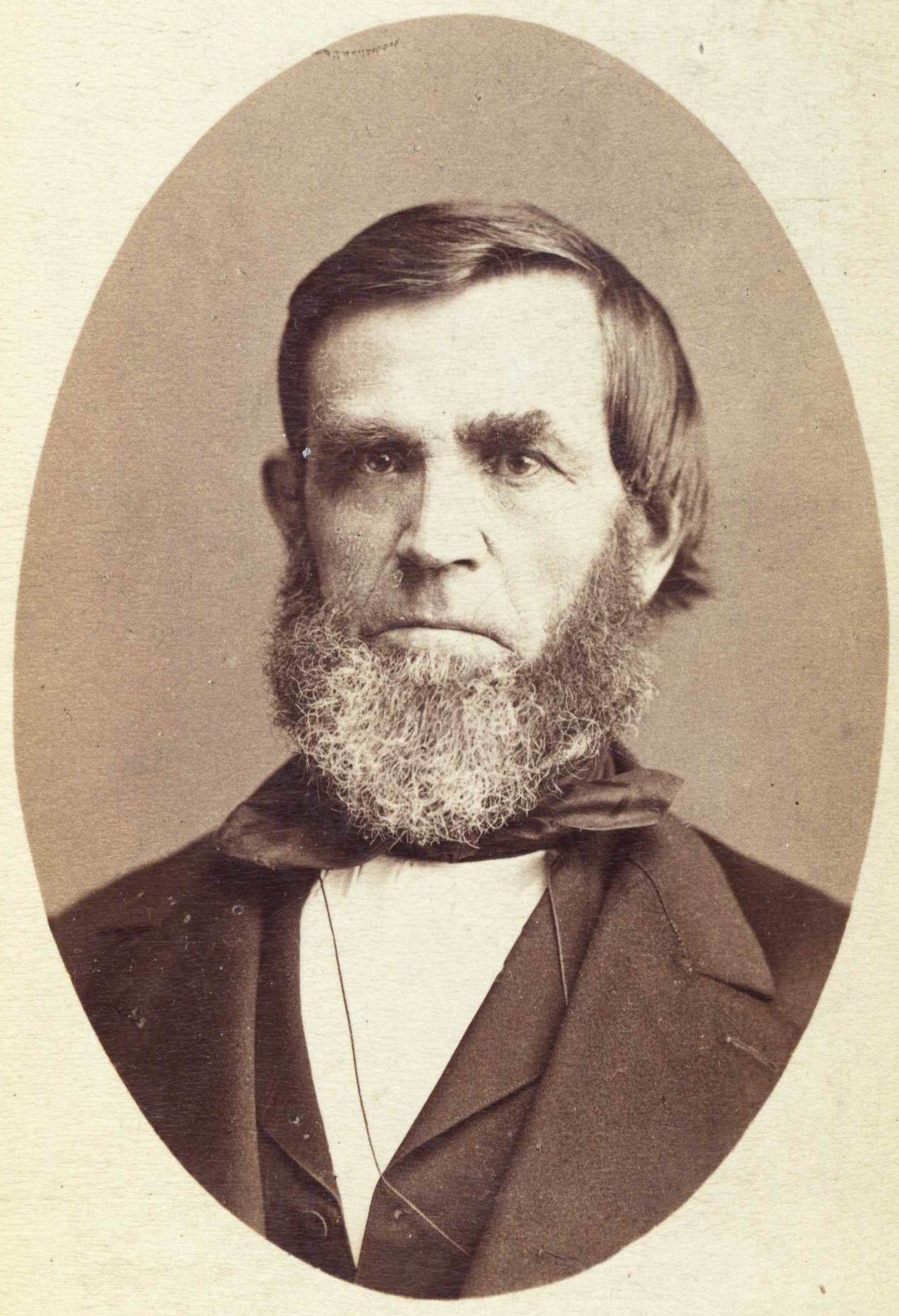 Søren Jaabæk (1814–1894), stortingsmann fra Holum ved Mandal, grunnlegger av Selskabet Bondevennerne.